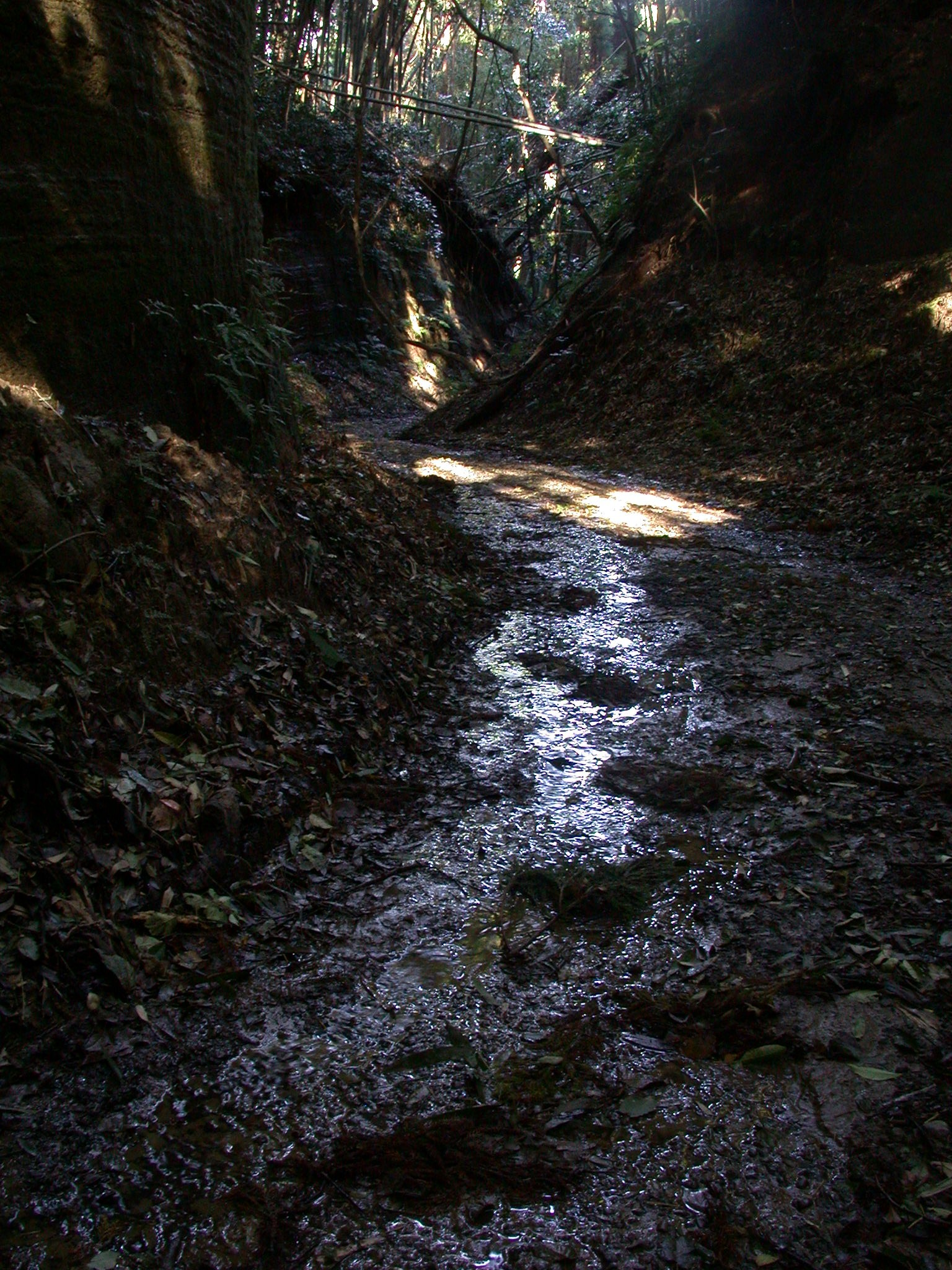 Toke Castle Kuranzaka